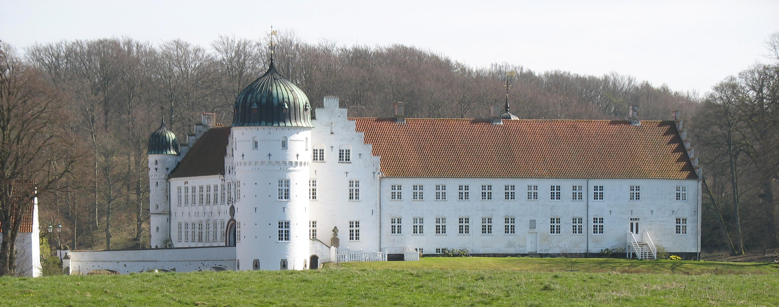 Torbenfeld Slot